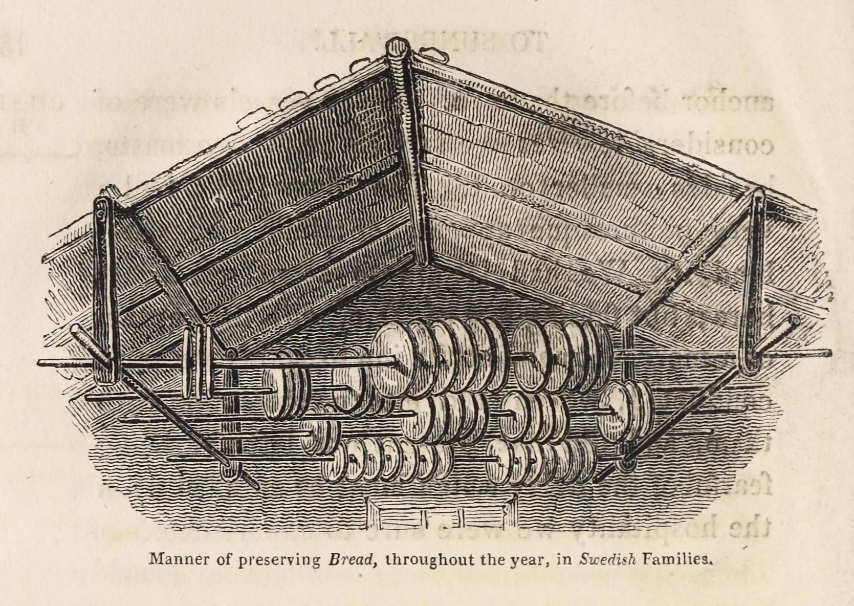 Illustrasjon hentet fra boken "Travels in various countries of Europe, Asia and Africa" av Clarke, Edward Daniel og utgitt av T. Cadell and W. DaviesLondon : T. Cadell and W. Davies, 1824 (London, 1824)